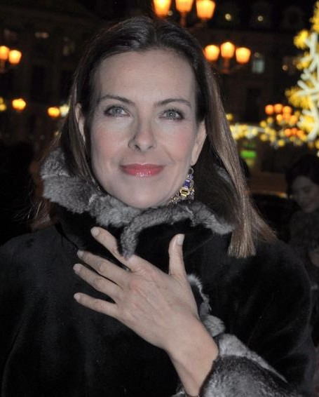 Carole Bouquet au dîner des révélations des César